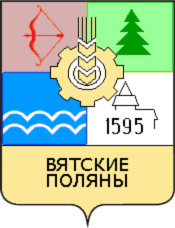 Герб Вятских Полян (1987 год)